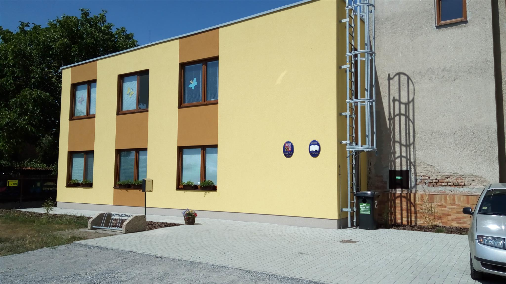 Obecní úřad Křečkov.